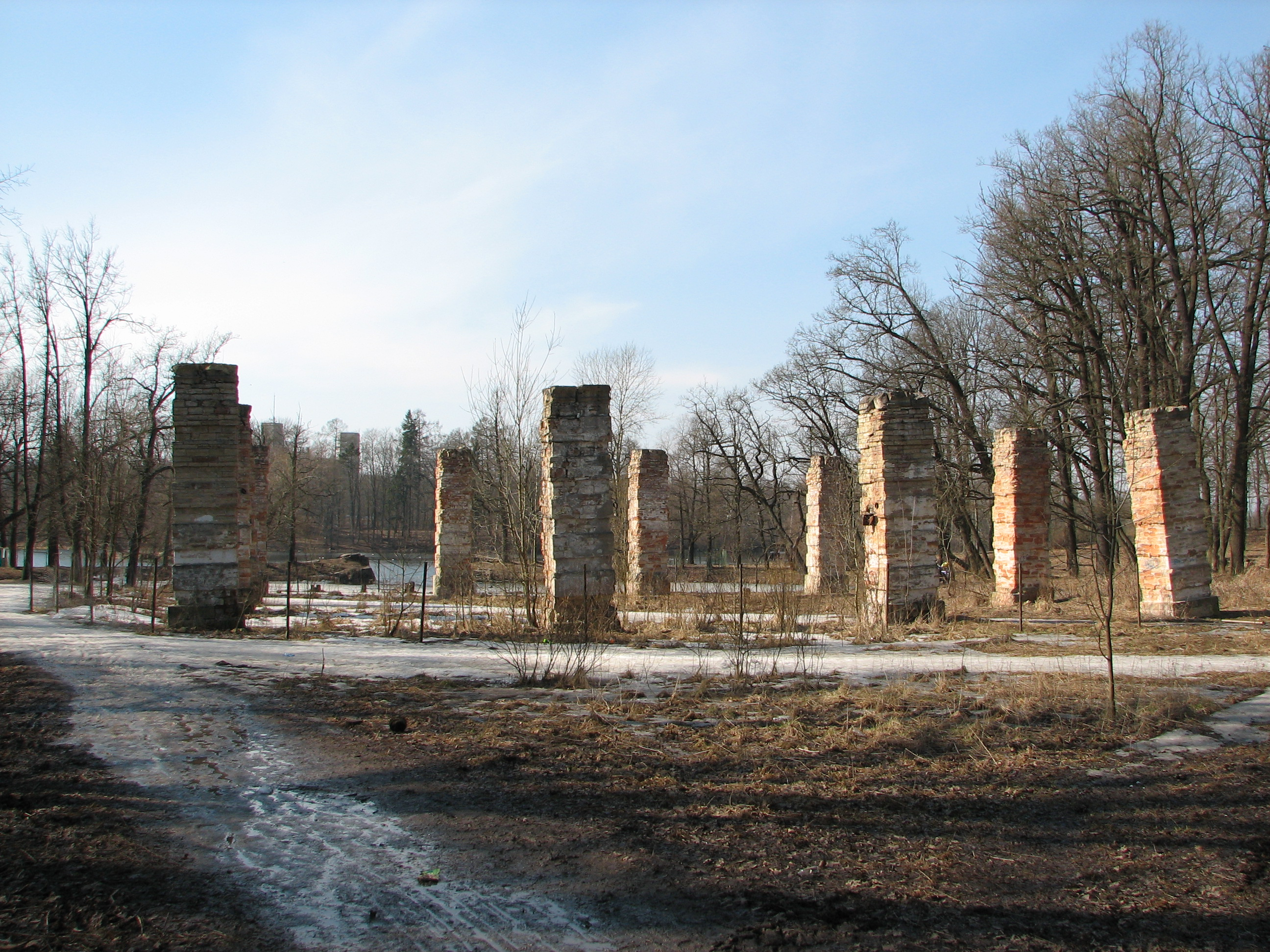 Руины Адмиралтейства в Гатчине